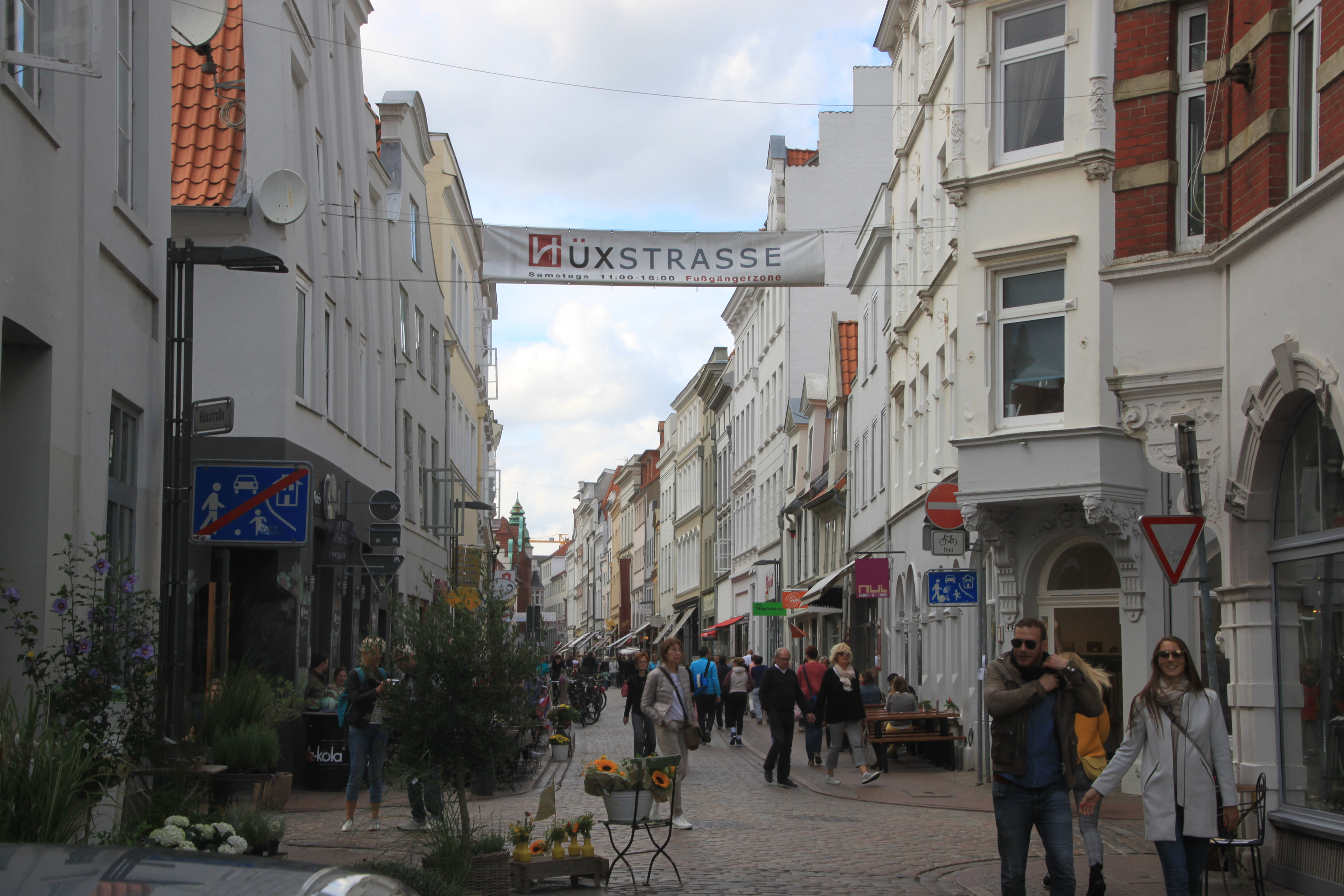 Hüxstraße, Lübeck Altstadt